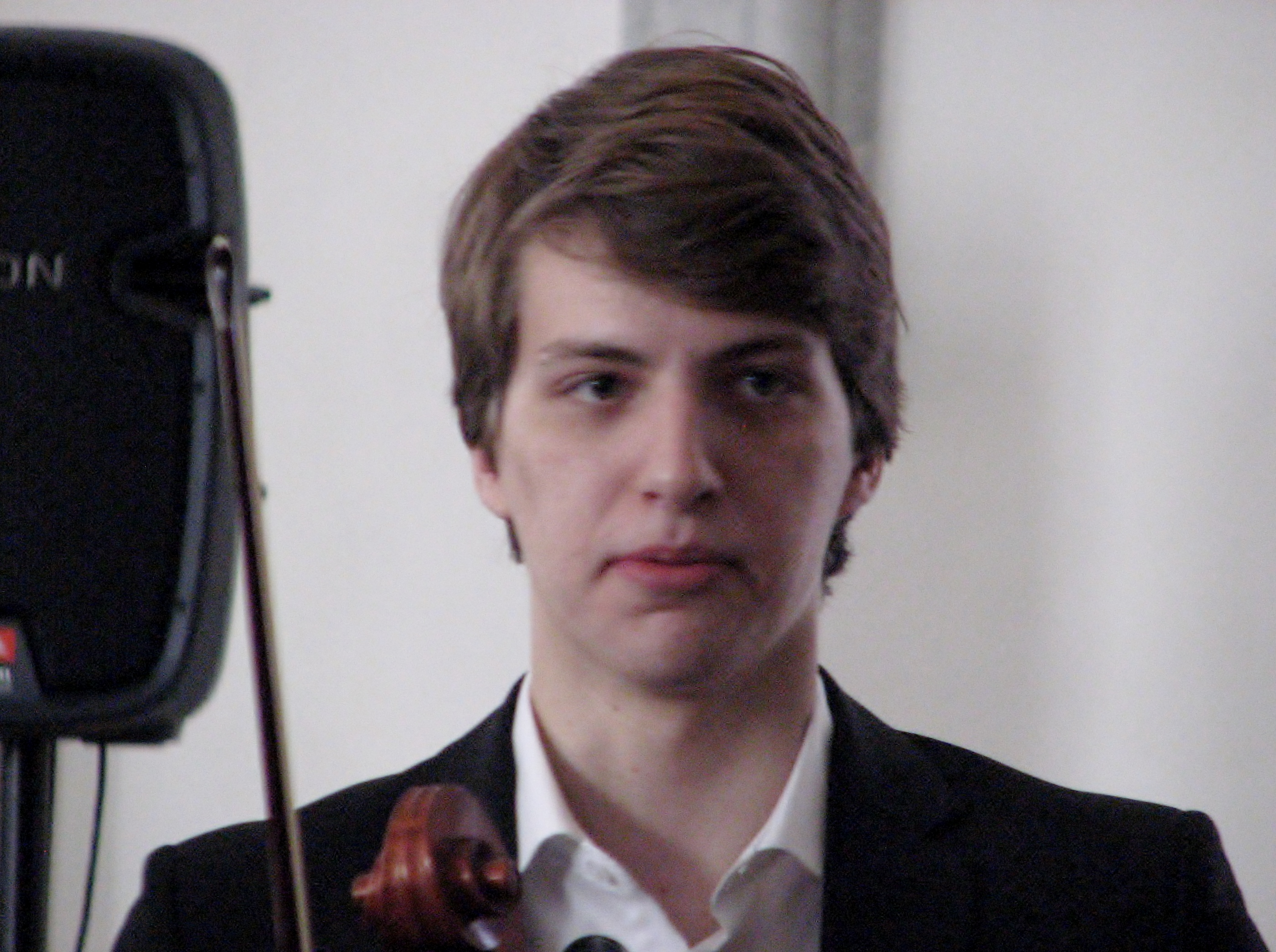 Marcel Johannes Kits esinemas karjääri- ja õppenõustamisspetsialistide tunnustusüritusel